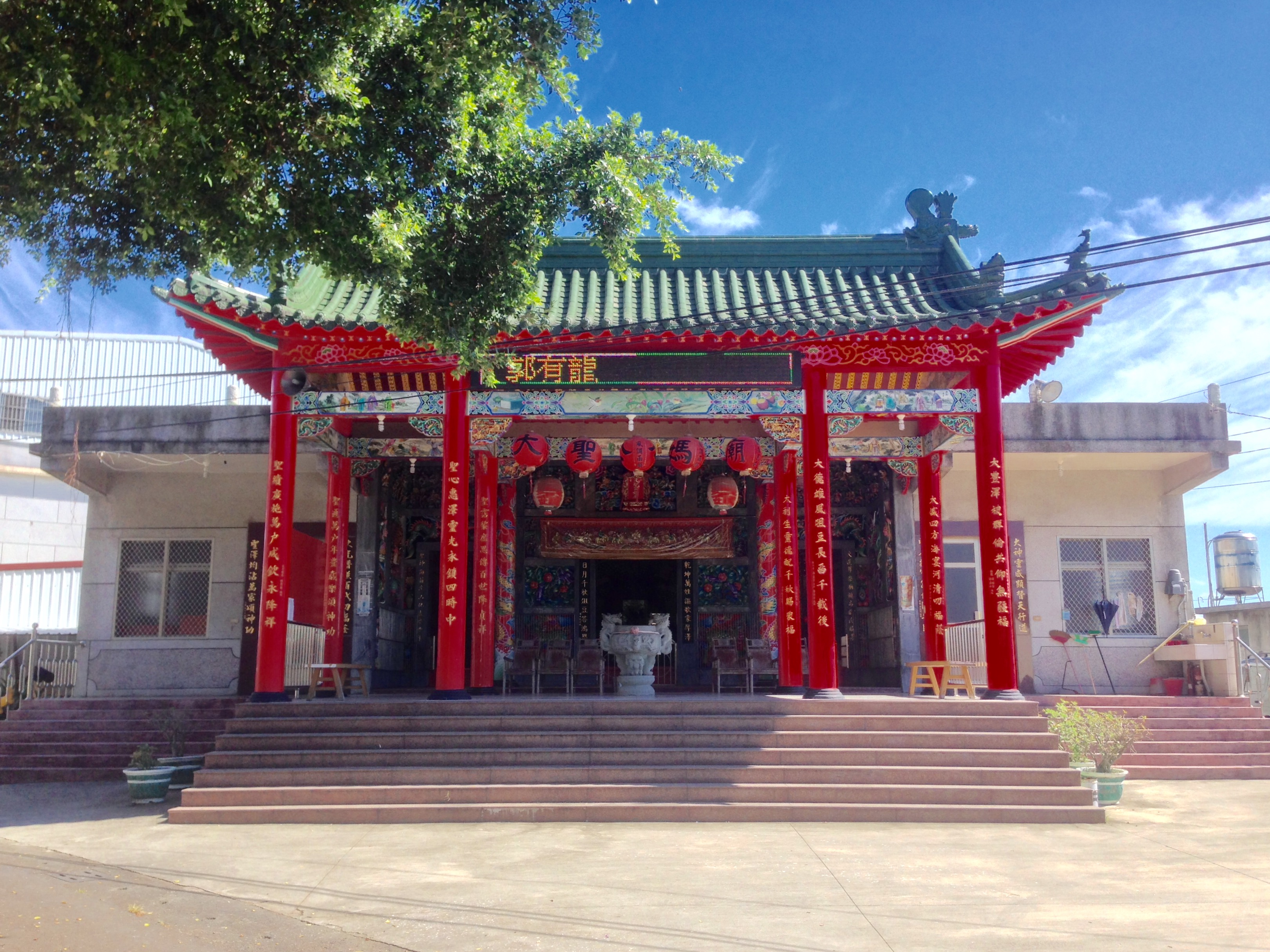 中文（台灣）: 百八番烏龍大聖公媽廟